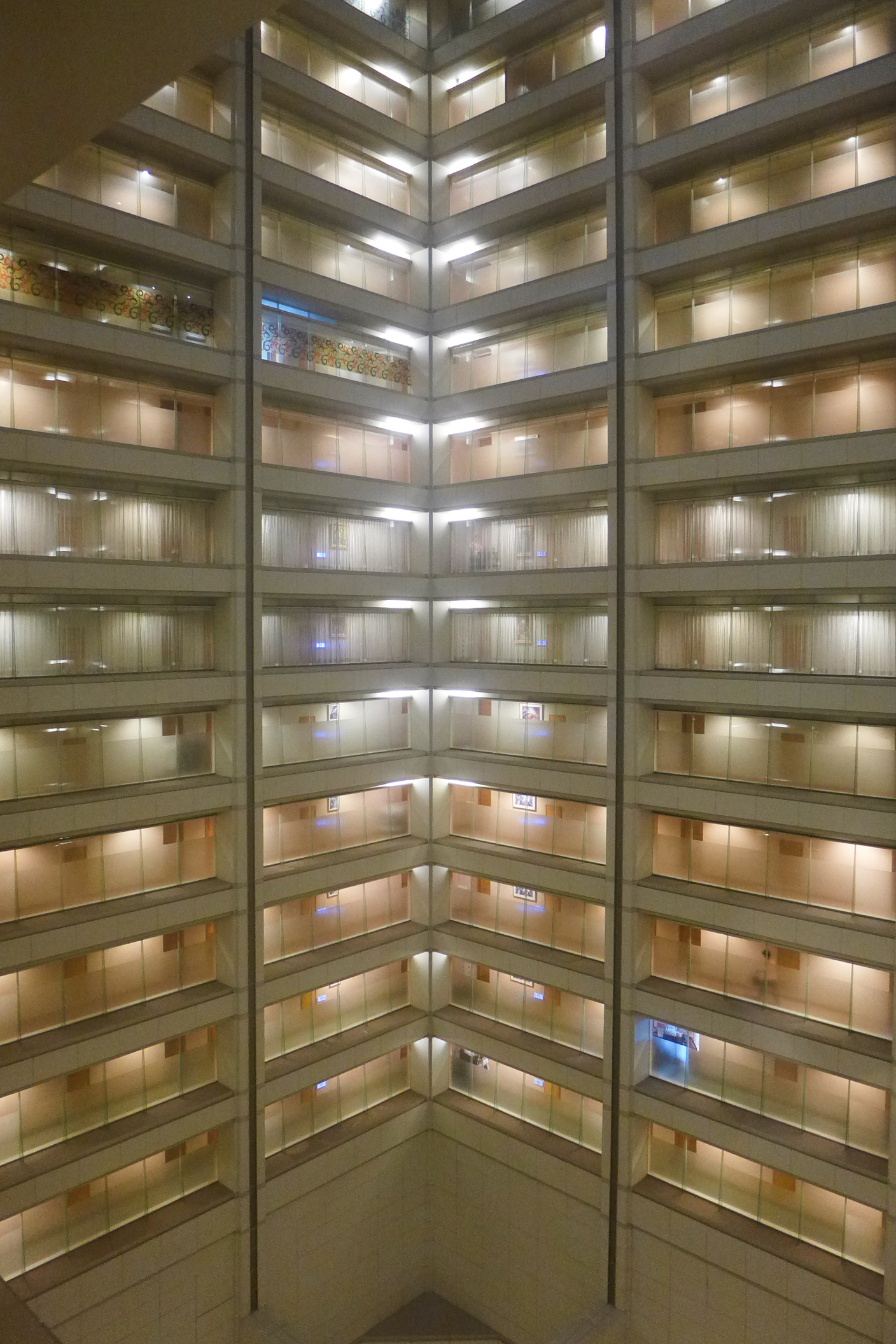 85 Sky Tower Hotel 45F-83F Void